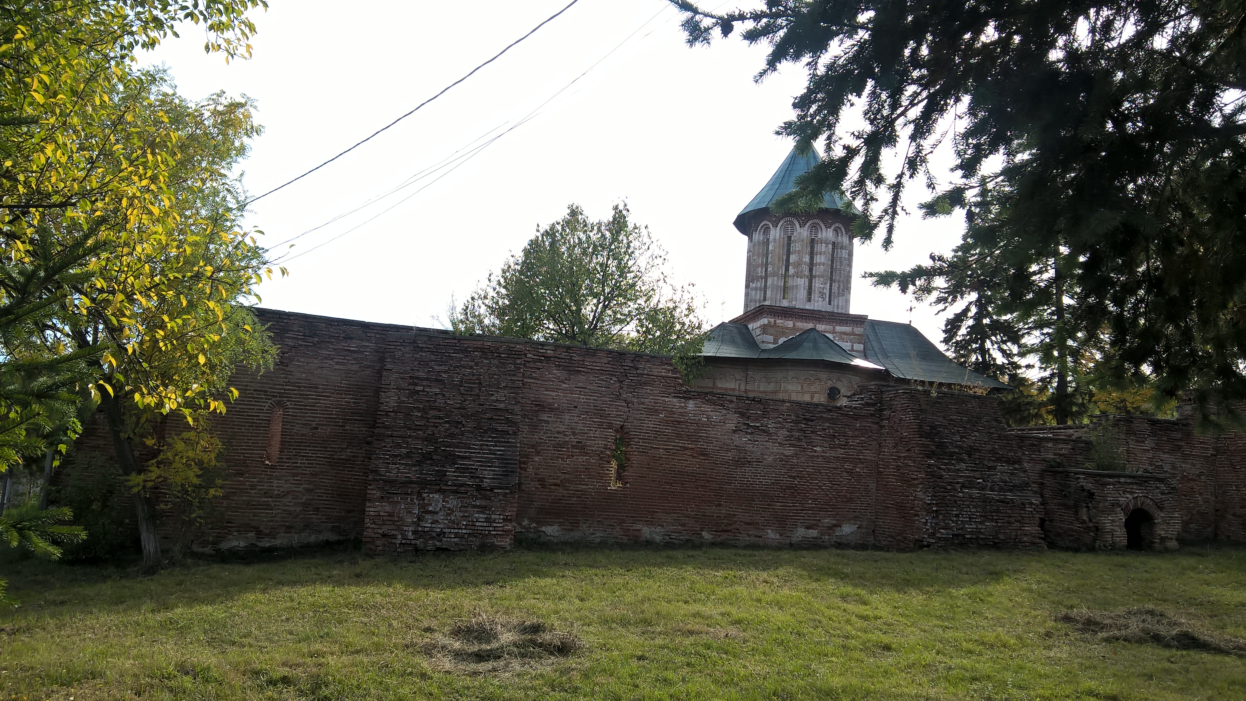 Zid de incintă 06